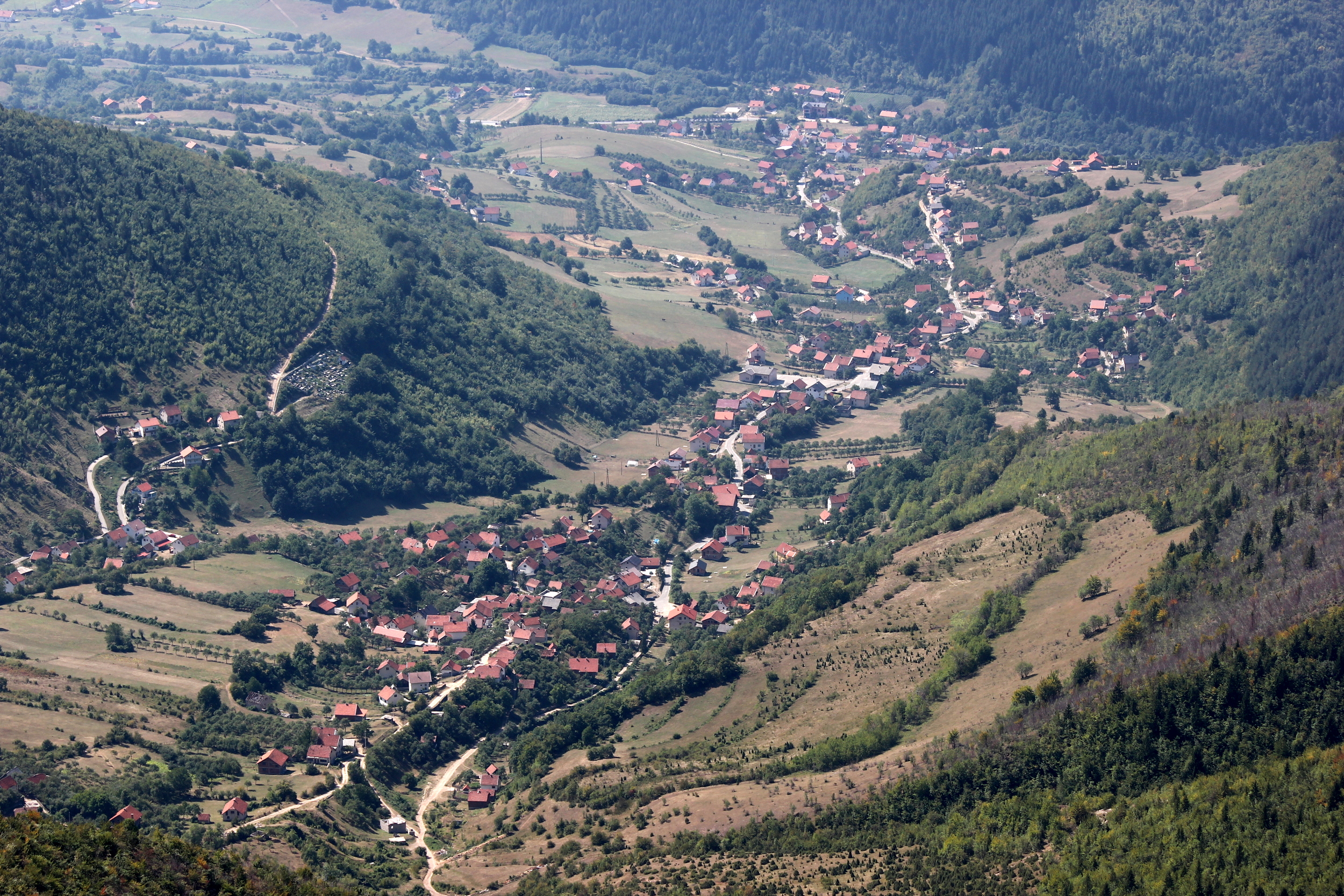 Das Dorf Paklarevo in der Gemeinde Travnik, Bosnien und Herzegowina.